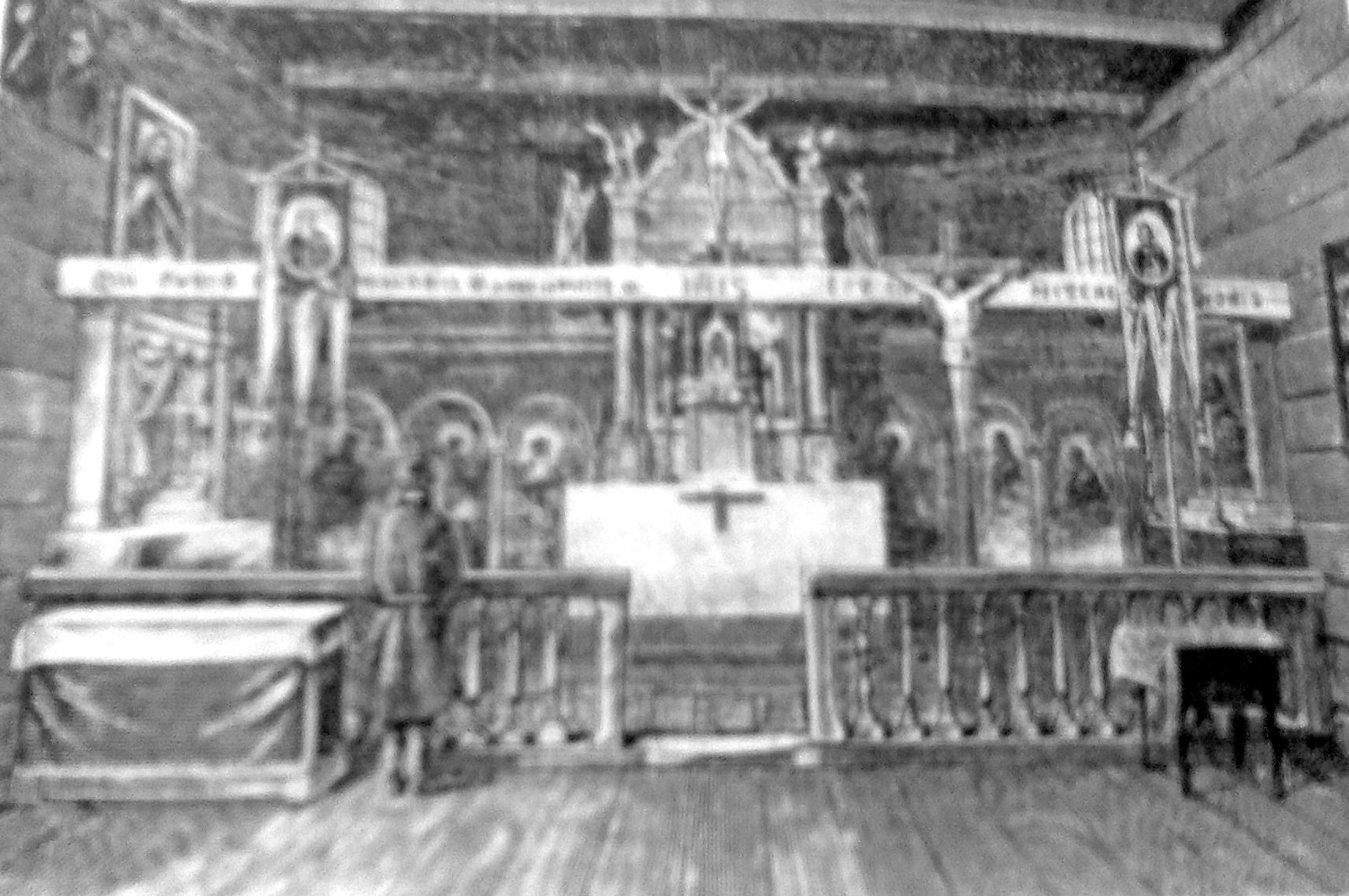 Wnętrze cerkwi św. Dymitra w Czerniejewie